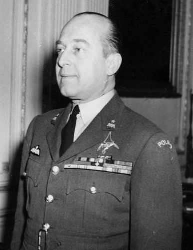 Mateusz Iżycki de Notto